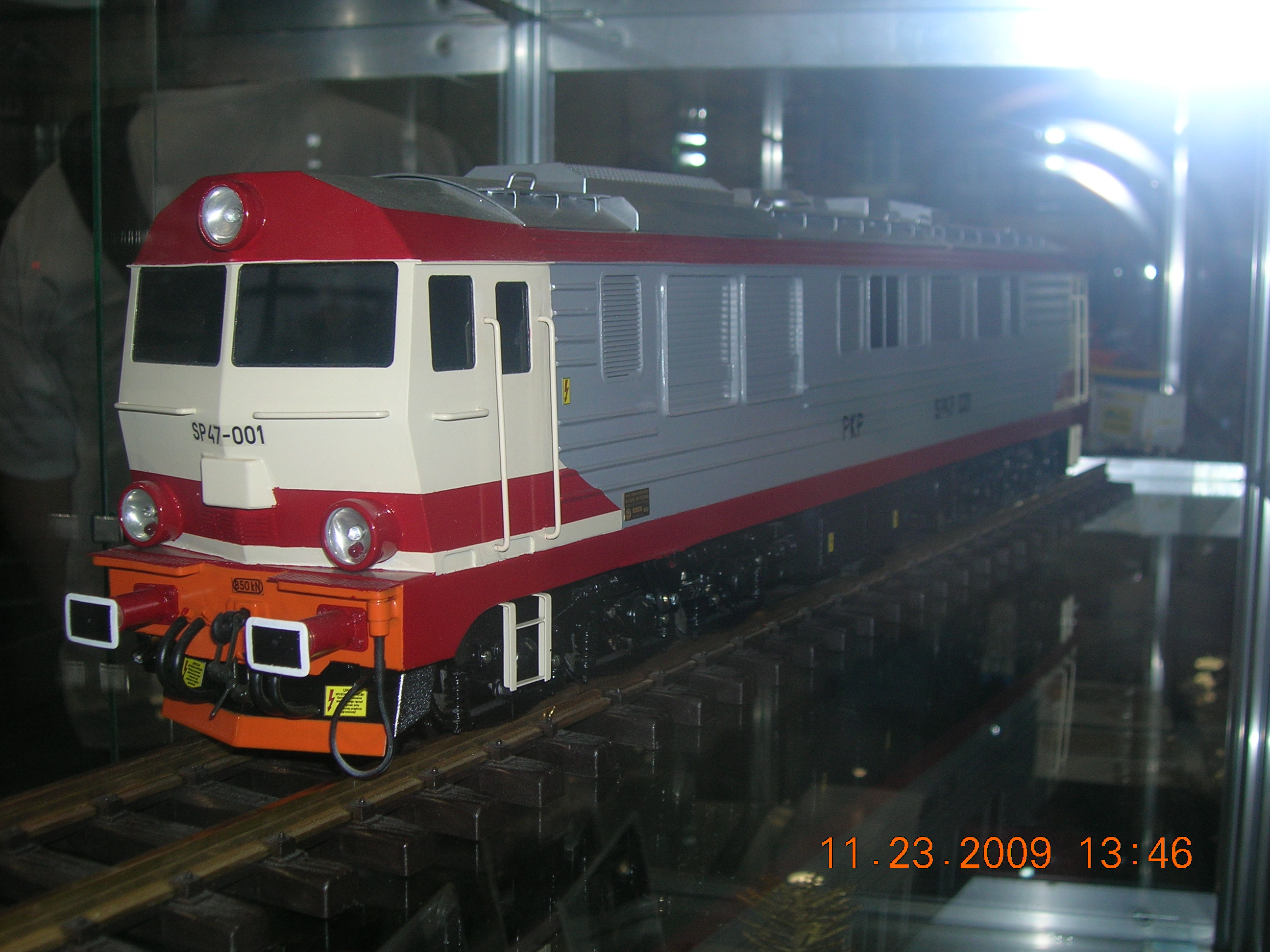 Hobby 2009